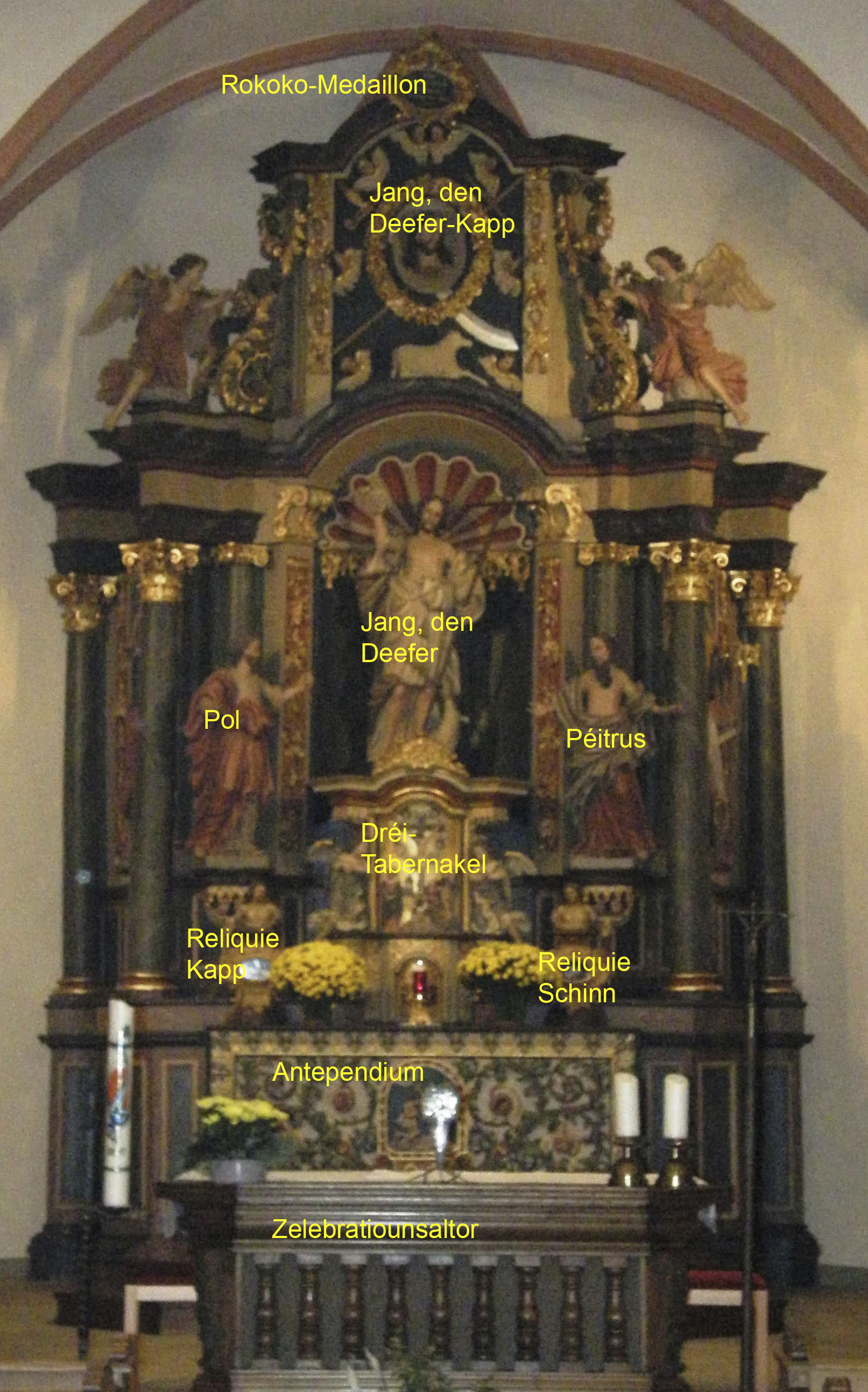 Feelen Haaptaltor komm.